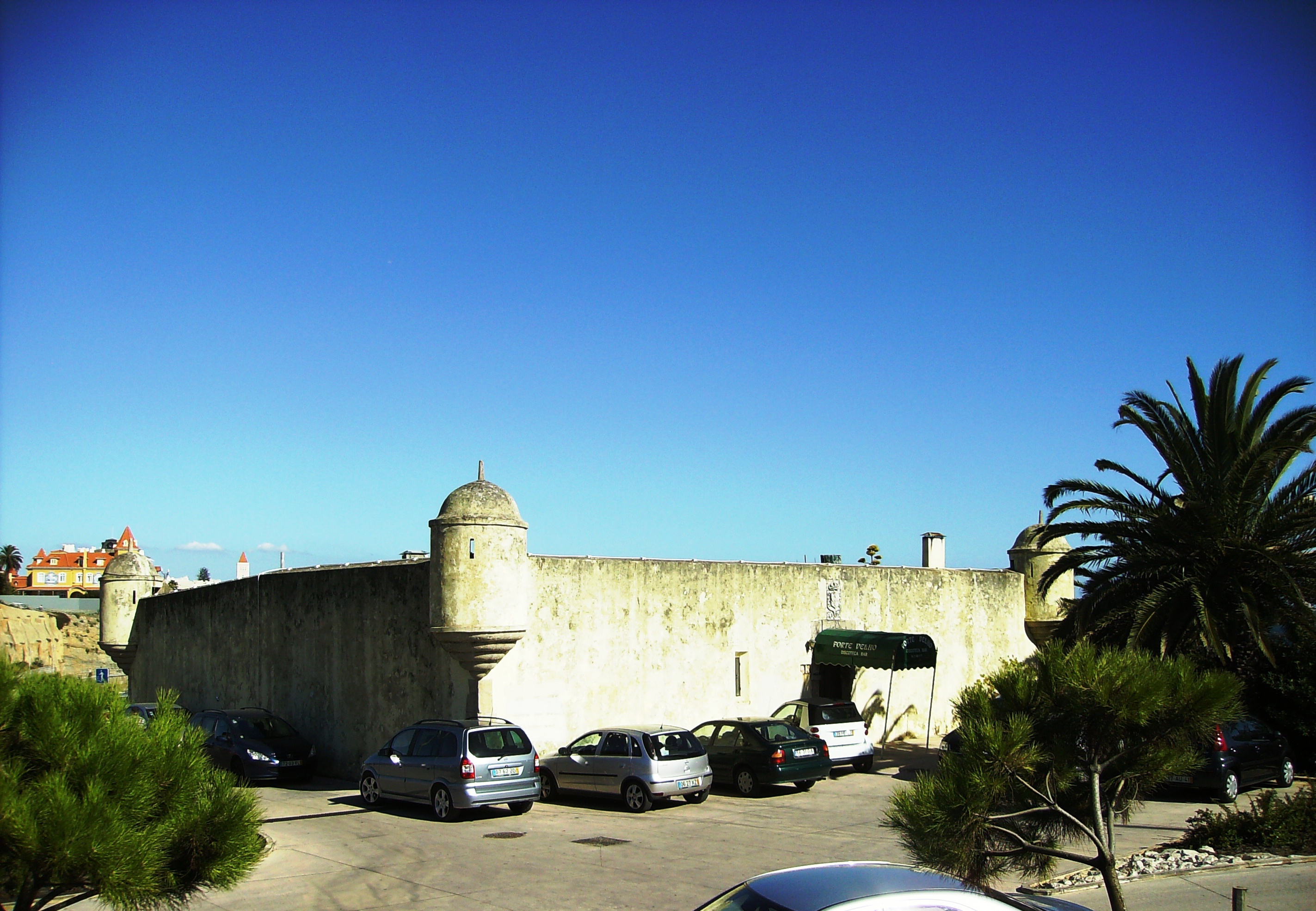 Forte de São Pedro do Estoril, Estoril, Cascais, distrito de Lisboa, Portugal.